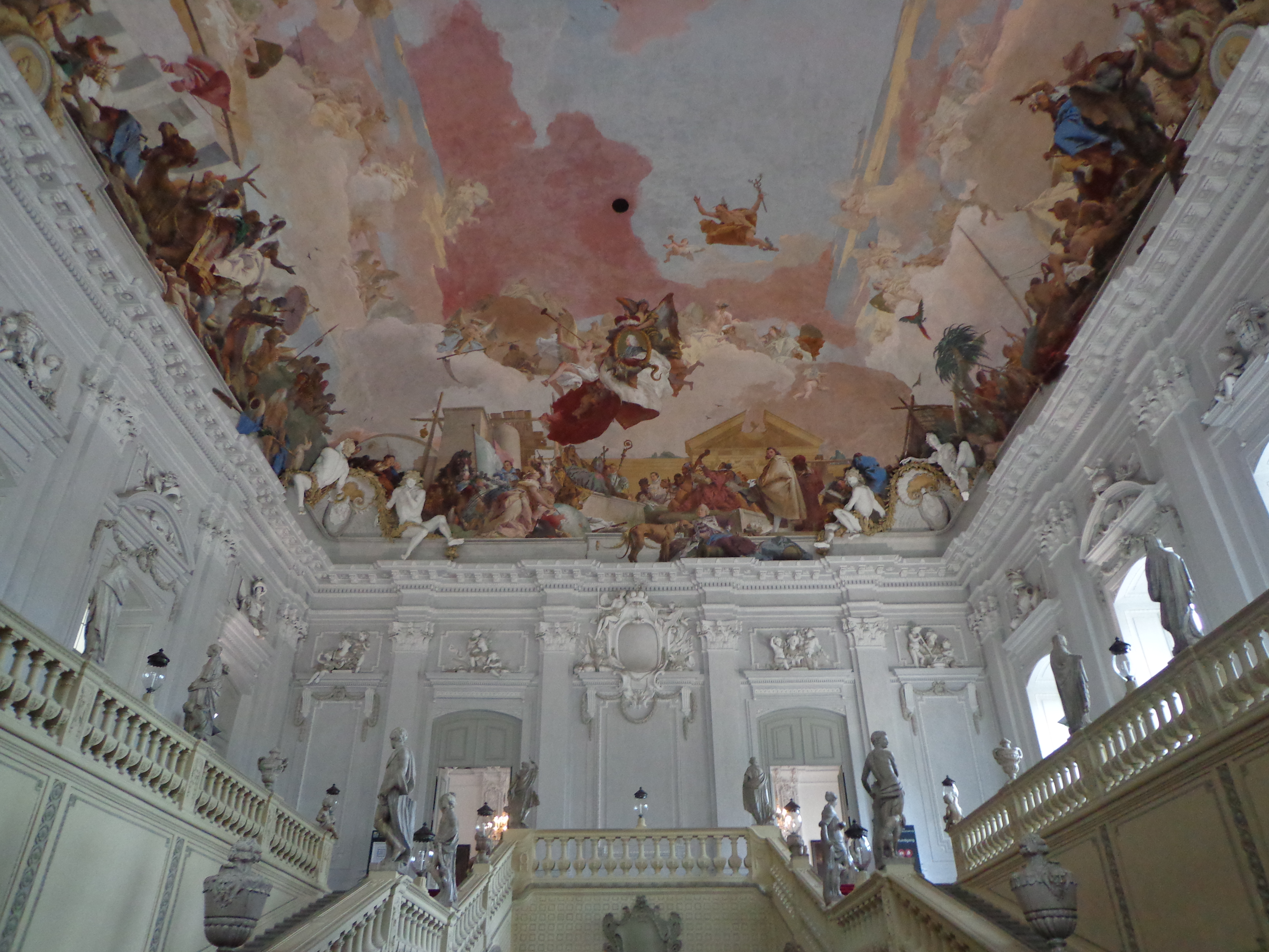 Die Missachtung des Fotografierverbots in dem Gebäude war keiner Absicht geschuldet!